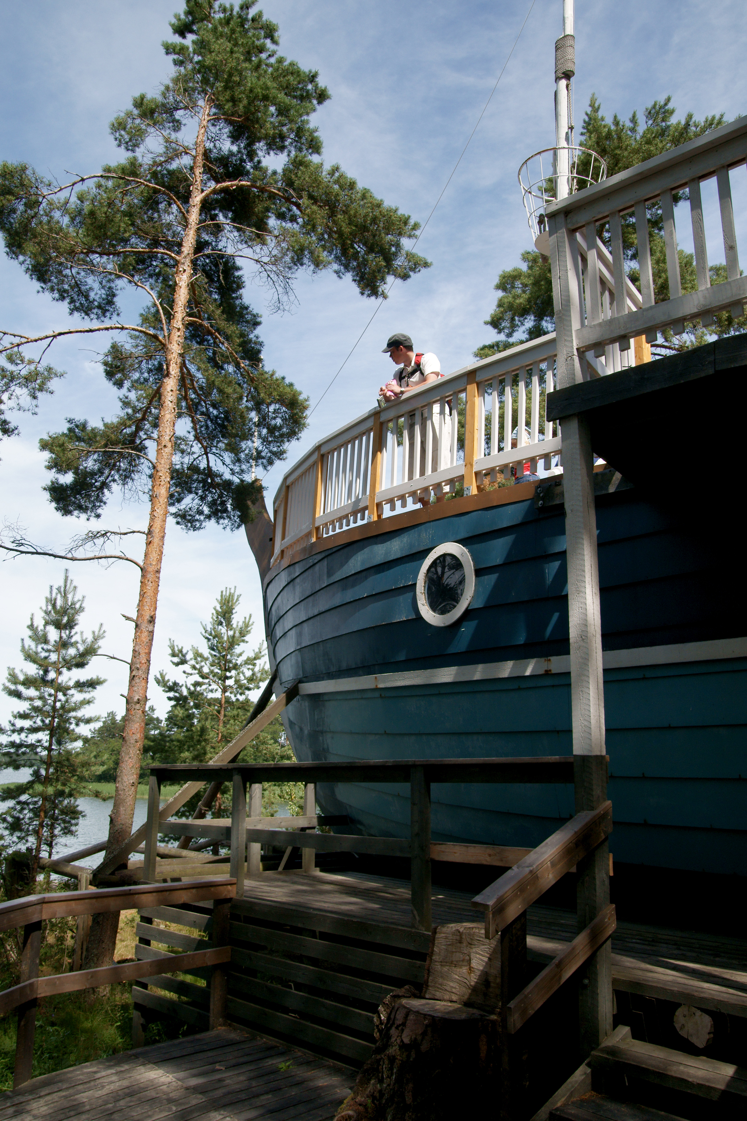 Muumipapan laiva Muumimaailmassa, Naantalissa.